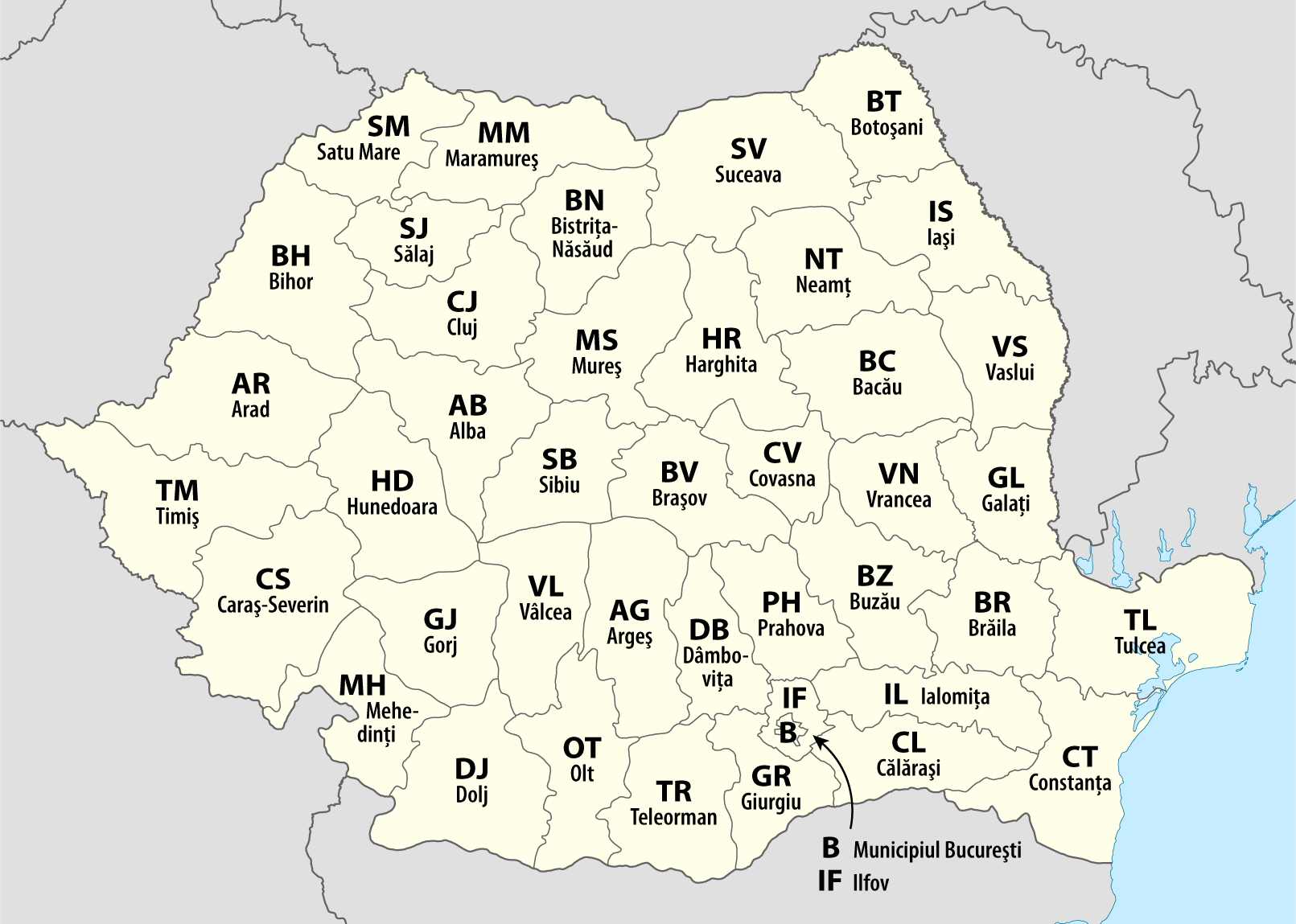 Romanian license plates codes